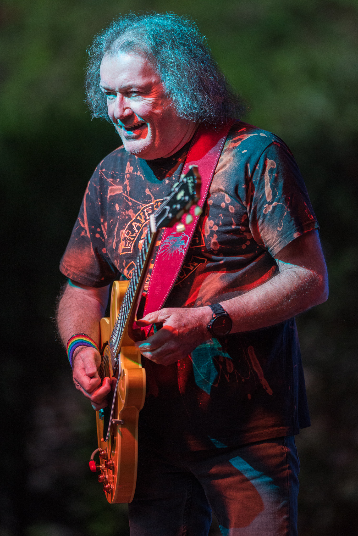 Concertbüro Franken,Geoff Whitehorn,Konzert,Livekonzert,Livemusik,Musik,Procol Harum,Serenadenhof